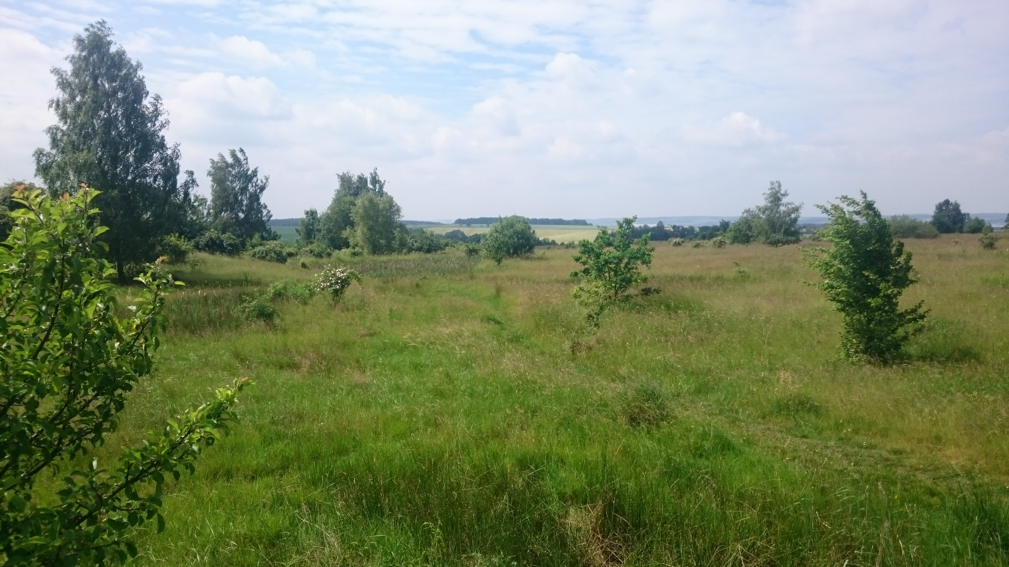 Das FFH Gebiet "Am Rümpfwald Glauchau"